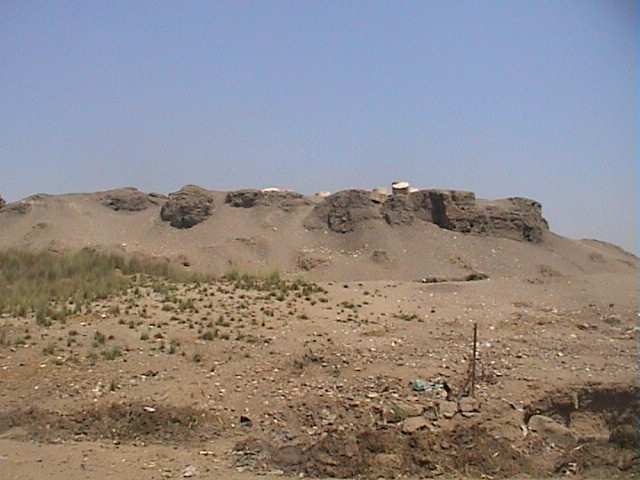 Vue des ruines du palais d'Apriès - XXVIe dynastie - Memphis - Mit Rahineh user:Neithsabes